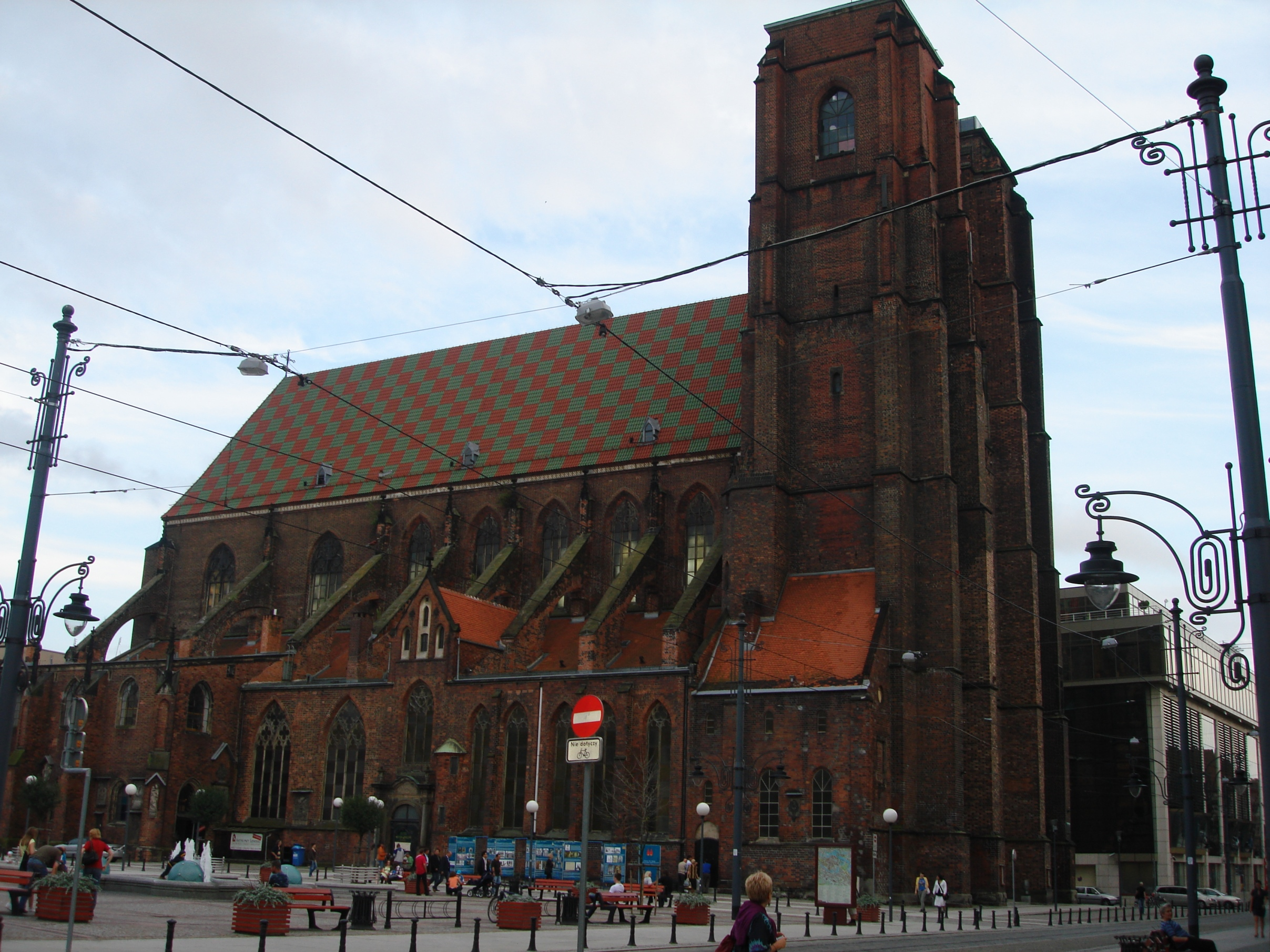 Wrocław - Katedra św Marii Magdaleny, Dolny Śląsk, Poland